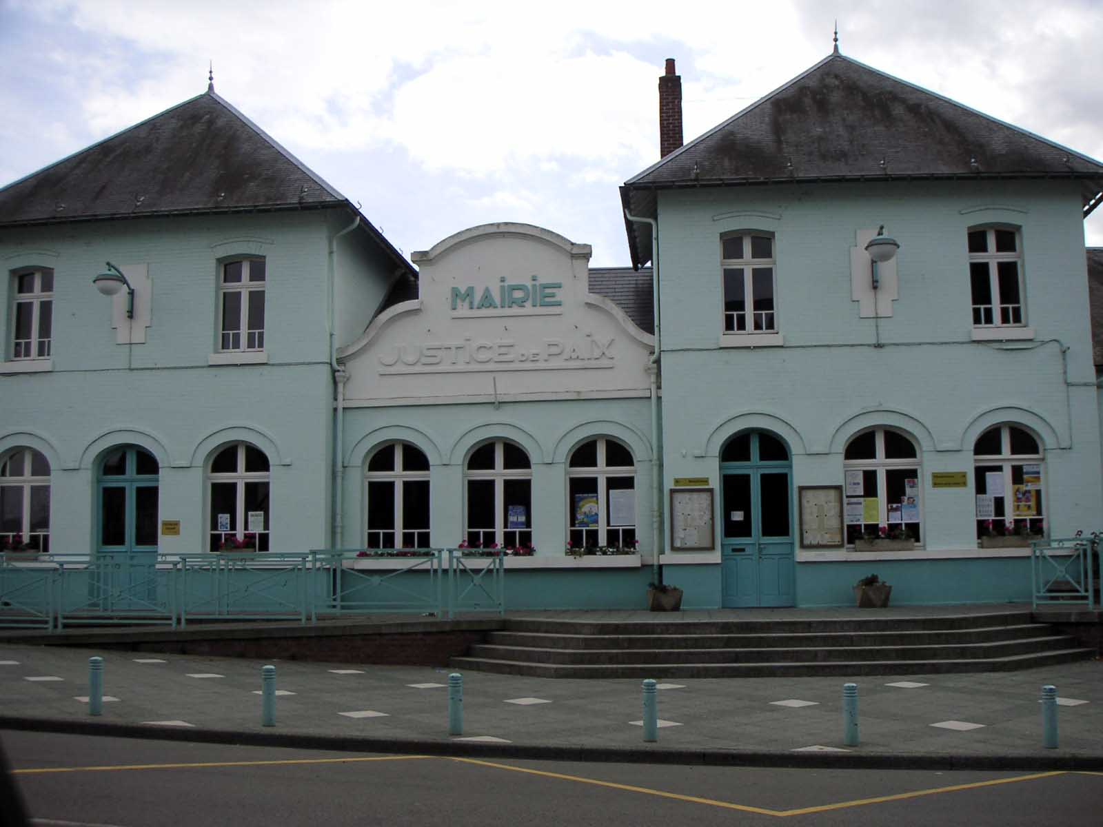 Façade de la Mairie de Marquion (Pas-de-Calais) Padawane